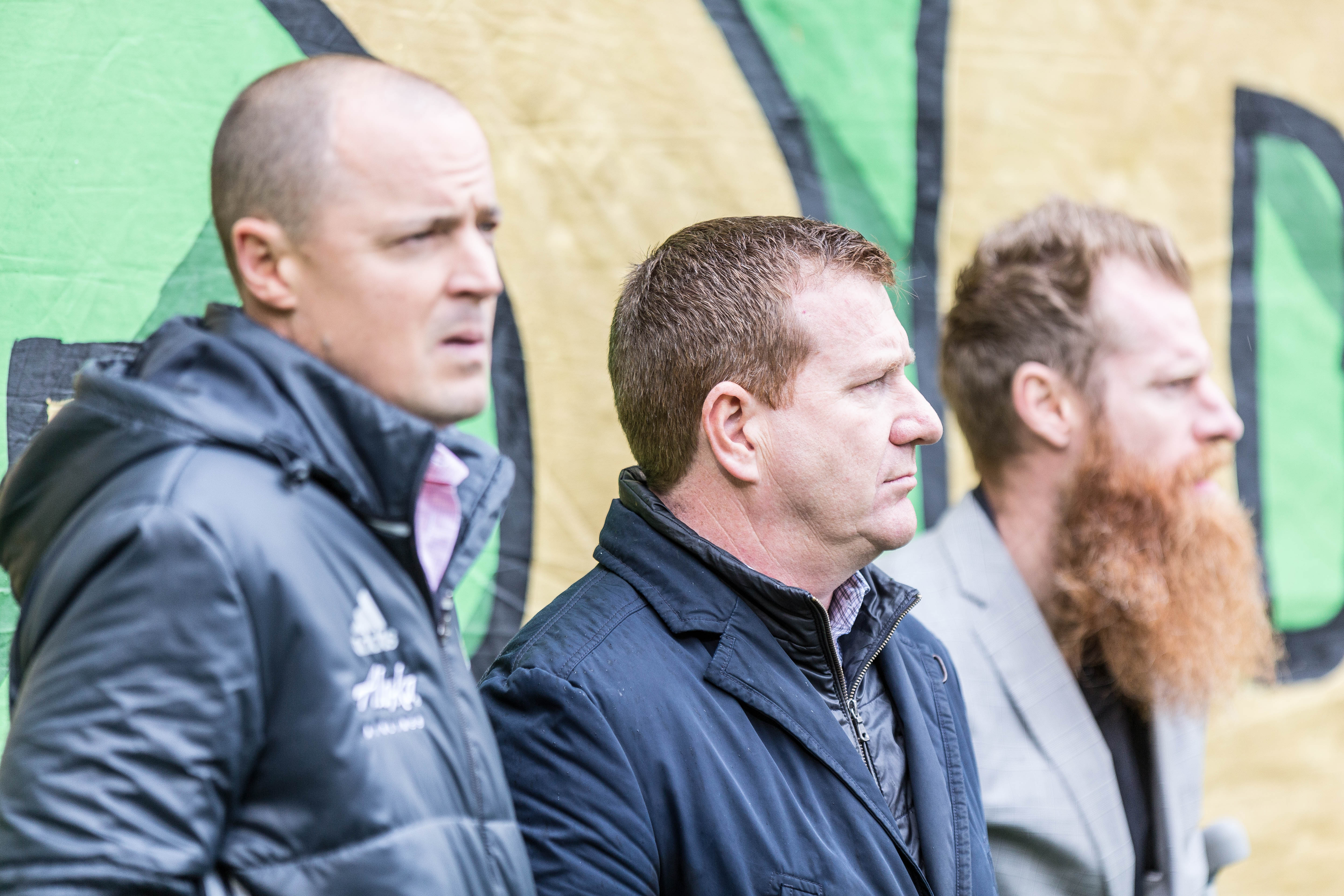 N42A0811.jpg